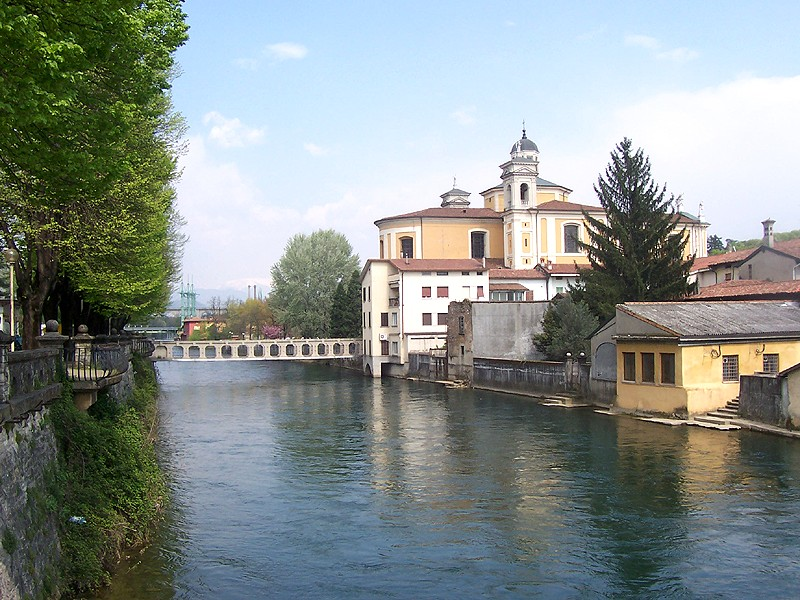 Palazzolo sull'Oglio - Fiume Oglio